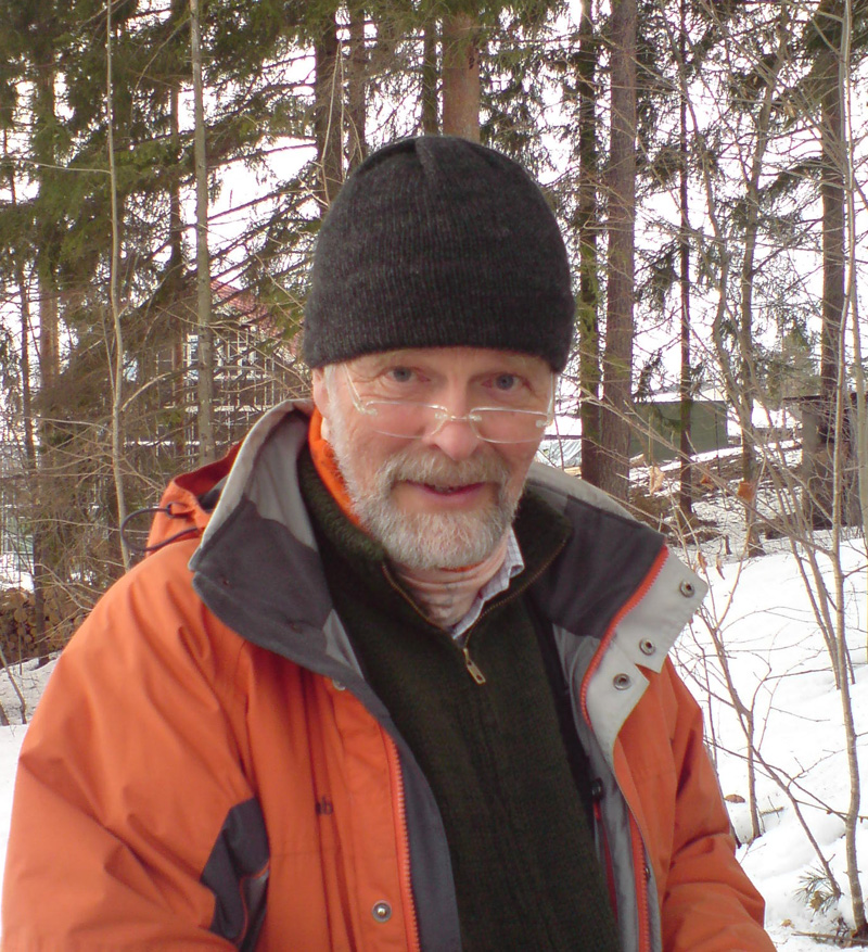 Arne Fjellberg